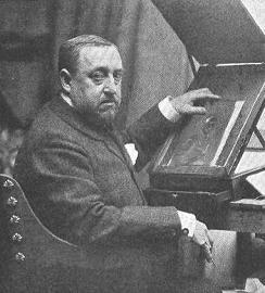 Autorretrato de Dalton Kaulak, recogido en la revista española Graphos ilustrado.